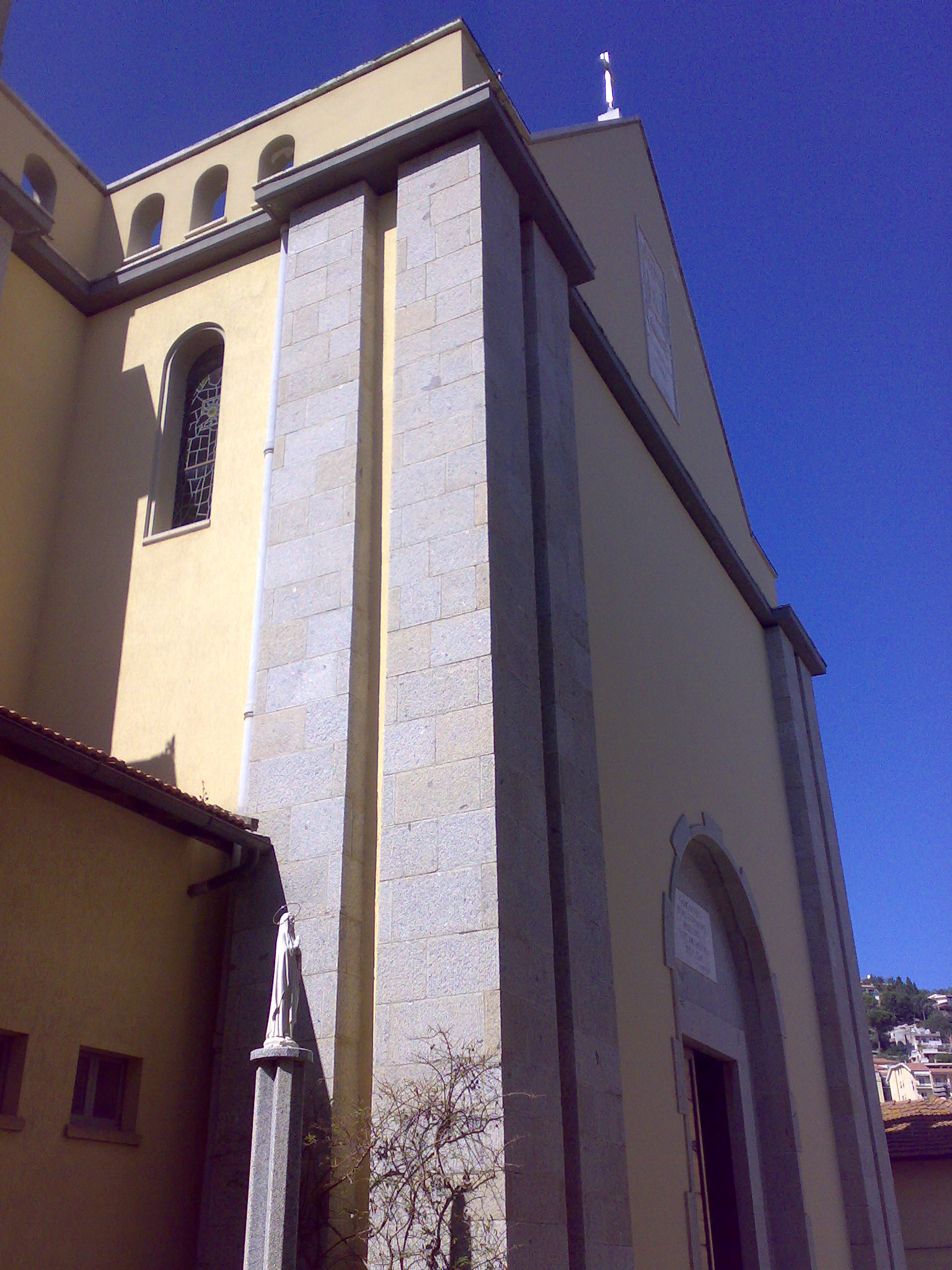 Facciata della chiesa di S.Stefano a Porto S.Stefano.